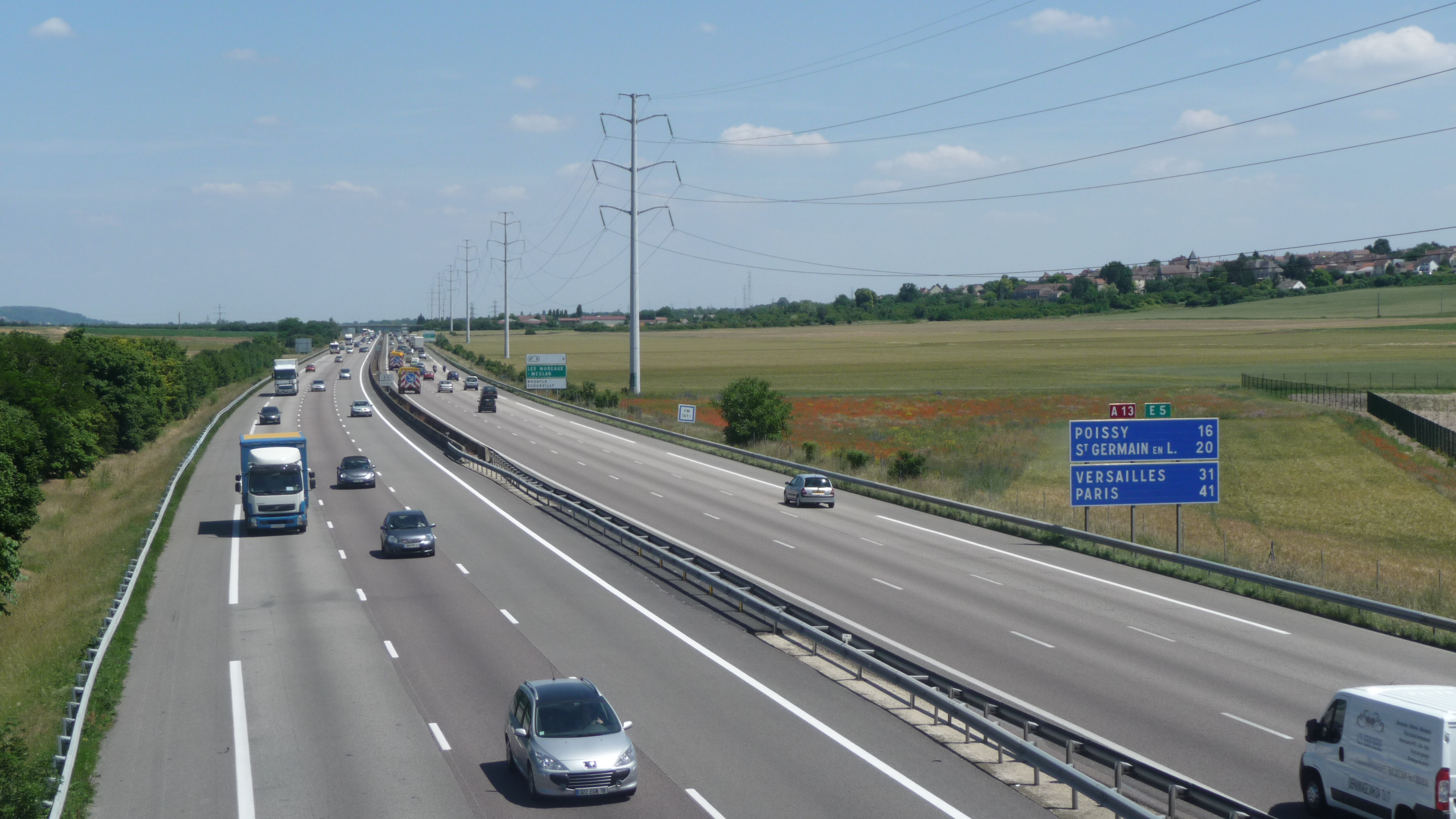 L'autoroute A13 au droit de Bouafle (à environ 40 km de Paris, vue en direction de cette ville)